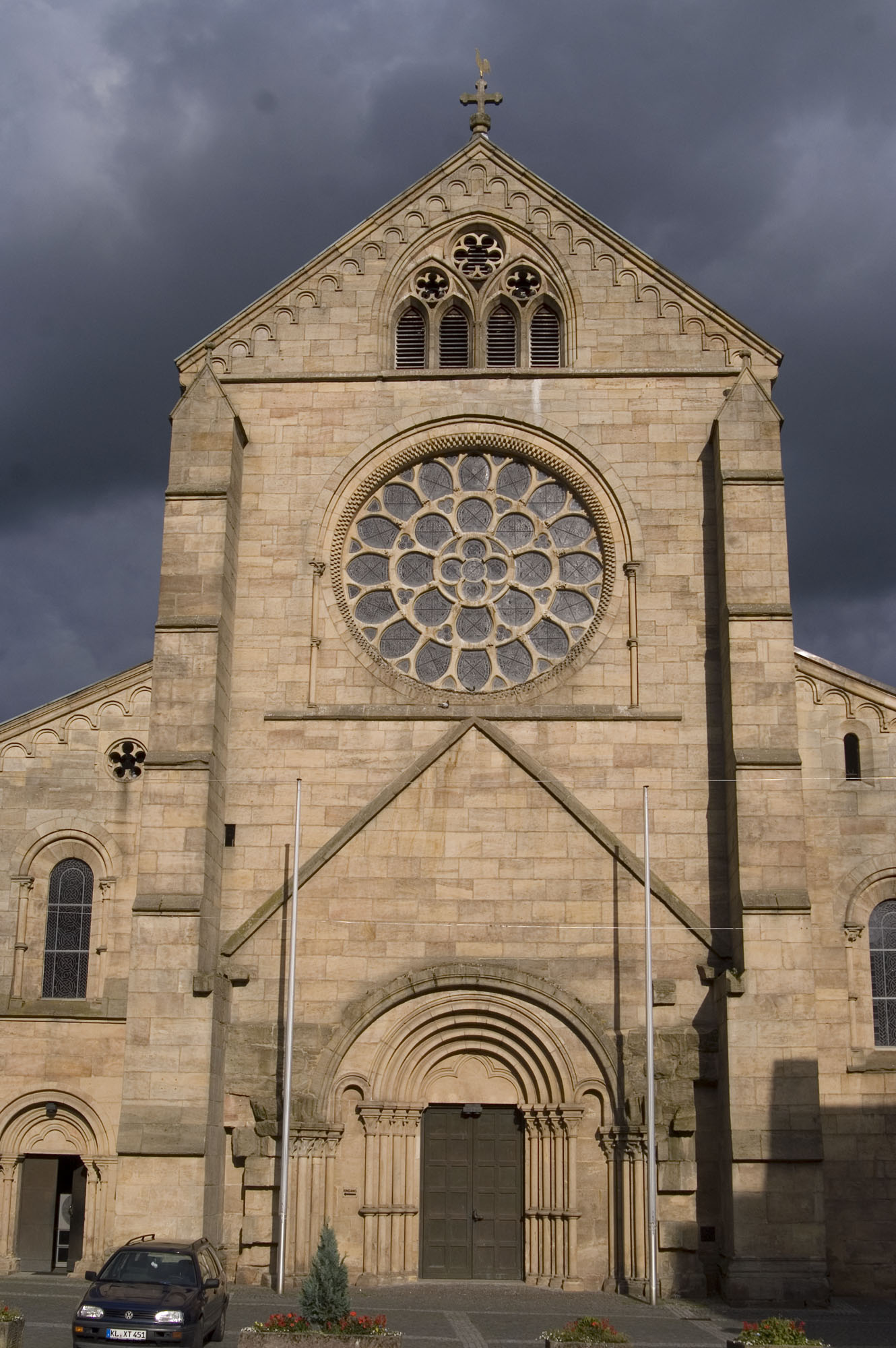 Kirchstraße 3: Simultanpfarrkirche Mariä Himmelfahrt; ehemalige Zisterzienserklosterkirche, spätromanische kreuzförmige Pfeilerbasilika, 1168 bis 1254